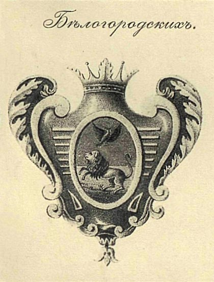 Герб Белгородских (пехотного и гарнизонного) полков: «Въ золотомъ щите, на голубомъ поле, желтый левъ, на зеленой земле, и надъ нимъ, одноглавый черный орелъ» из Знамённого гербовника 1730 года. Рис. № 253.